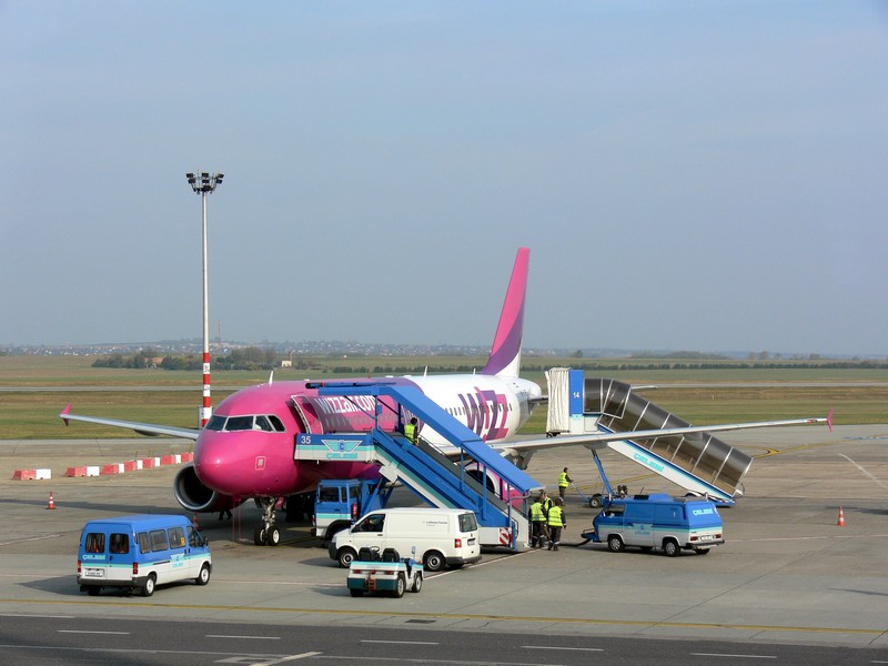 WizzAir Airbus A320-200 Ferihegy 1-en (Budapest)